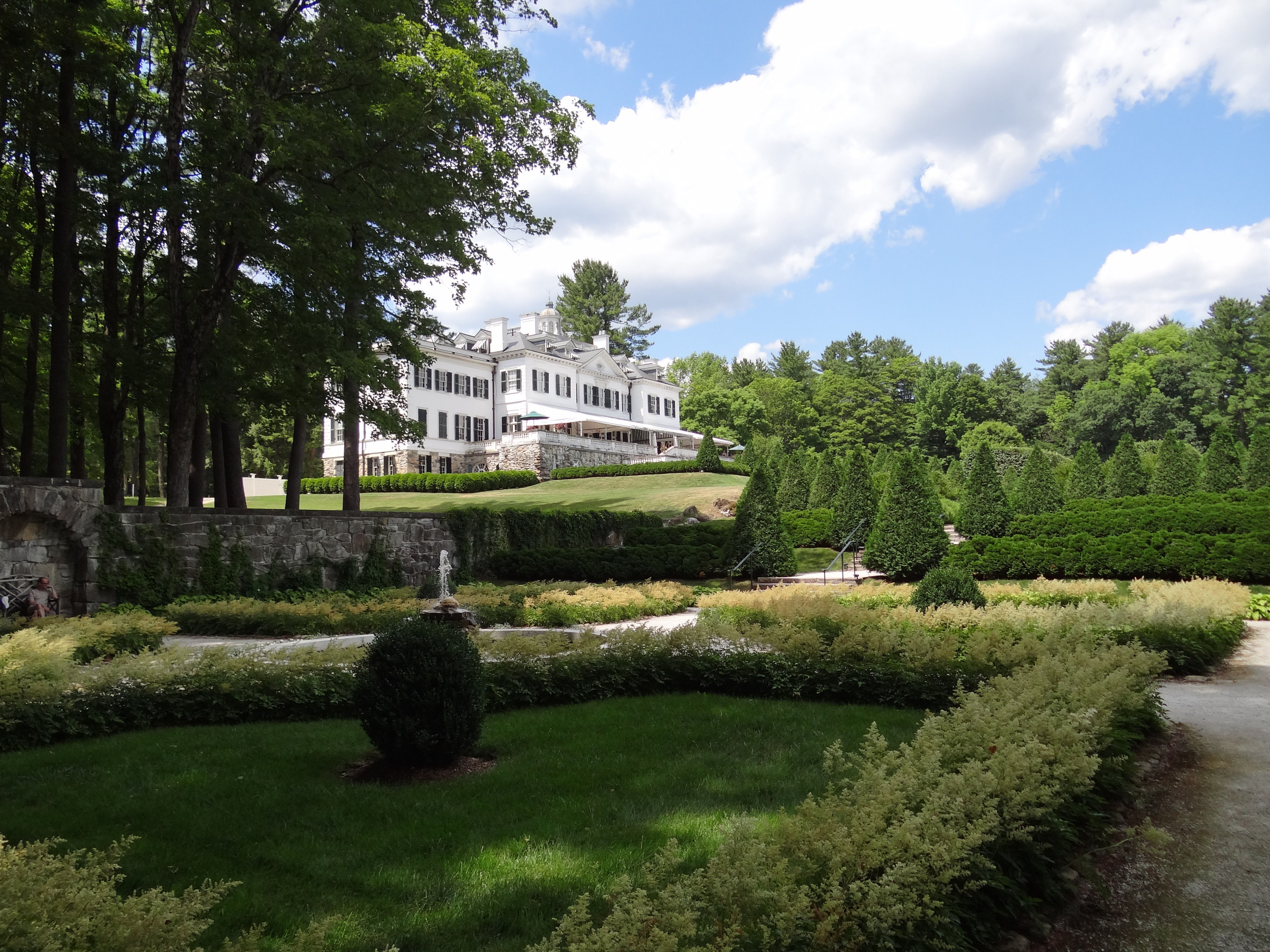 Edith Wharton legde The Mount (ook bekend als de Edith Whartontuin) aan in 1902. Het is het enige voorbeeld van Edith Whartons ontwerptheorieen, zowel qua architectuur als landschap, een een van de weinige natuurhistorische locaties gecreerd door een vrouw. Een nichtje, Beatrix Ferrand, werd erbij gehaald om te helpen bij het ontwerp. Wharton paste veel invloeden van haar Europese reizen toe en deze zijn overal te zien. Farrand ontwierp de een kilometer lange oprijlaan, die zich door het landschap slingert, waar alle bijgebouwen van het landgoed goed te zien zijn, iets wat totaal ingaat tegen de Engelse landschapstraditie. De tuinen werden bedoeld als verlengstuk van het huis en Wharton vond het belanggrijk dat tuinen 'in elk seizoen mooi' waren. The Mount heeft een elegantie en charme die doet denken aan de Italiaanse renaissance. Als u achter het huis naar beneden loopt, over het ruime terras en de brede trap naar het looppad dat de lindenlaan in tweeen deelt, komt u in de bloementuin, waar een prachtige, ommuurde Italiaanse tuin is beplant in groene en witte tinten. De rest van de bloementuin is een wild palet van kleuren, met veel rood, violet en roze, een echte 'overdaad aan bloemen' in vier enorme, vier meter brede borders rondom een vijver. De afgelopen jaren is dankzij renovatie het landgoed voor verval behoed. Bron: Ruth Chivers in "1001 Tuinen die je gezien moet hebben"